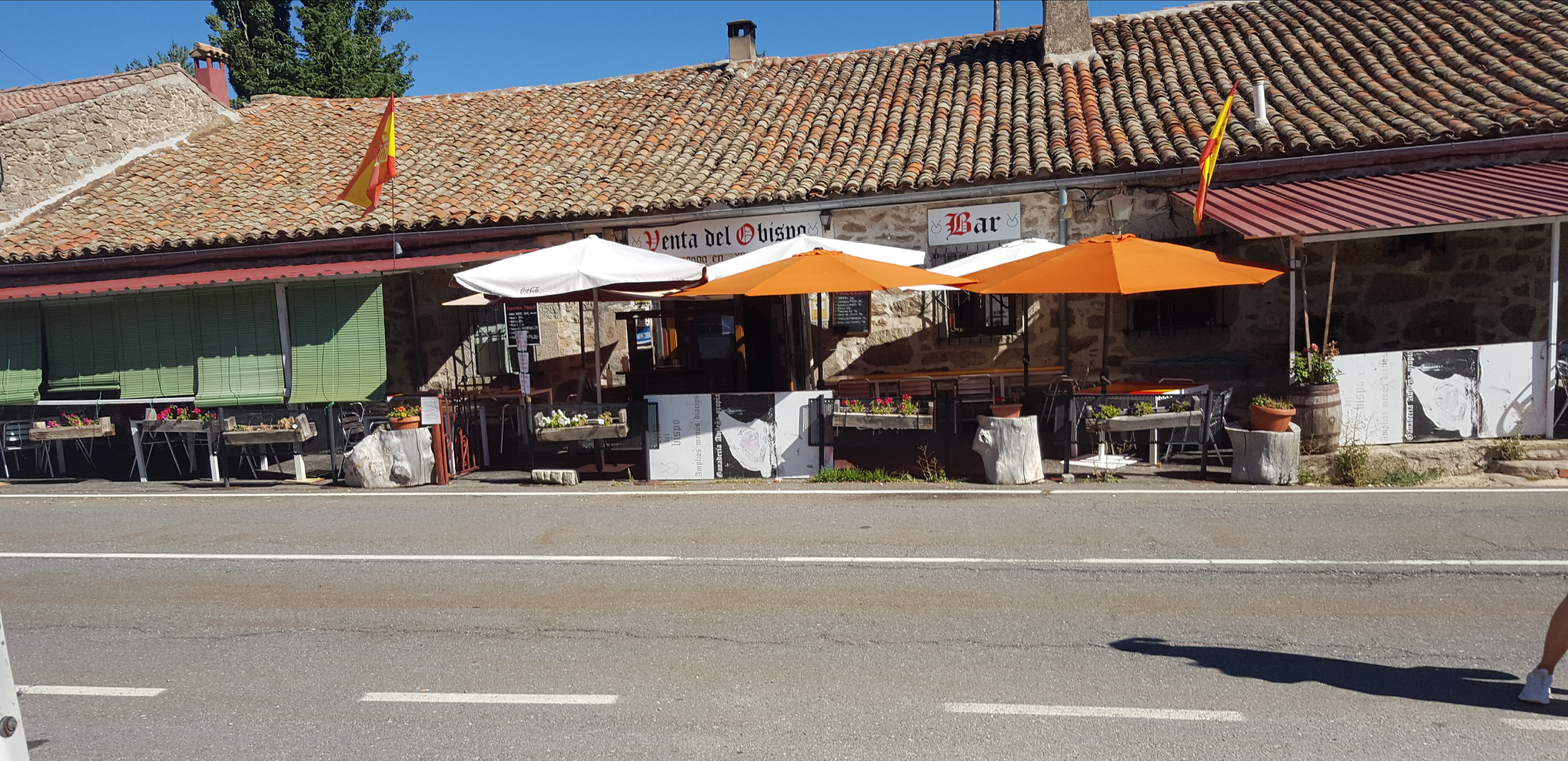 Venta en San Martín del Pimpollar, Ávila, España